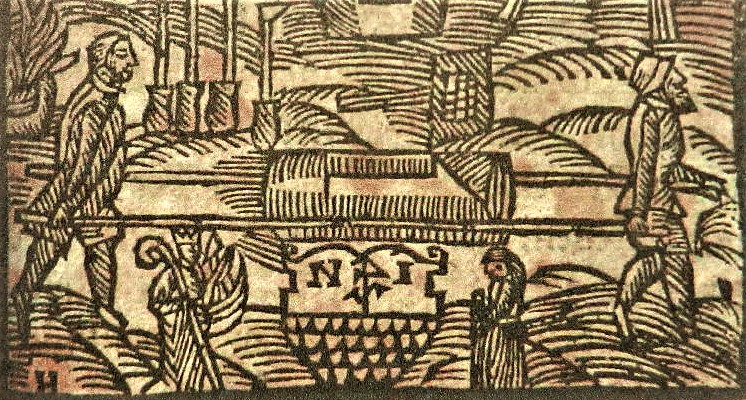 Nickel Jacob mit Vater einen Bienenkorb tragend, darunter die Sprottauer Hausmarke N J im Wappen, Holzschnitt vor 1576